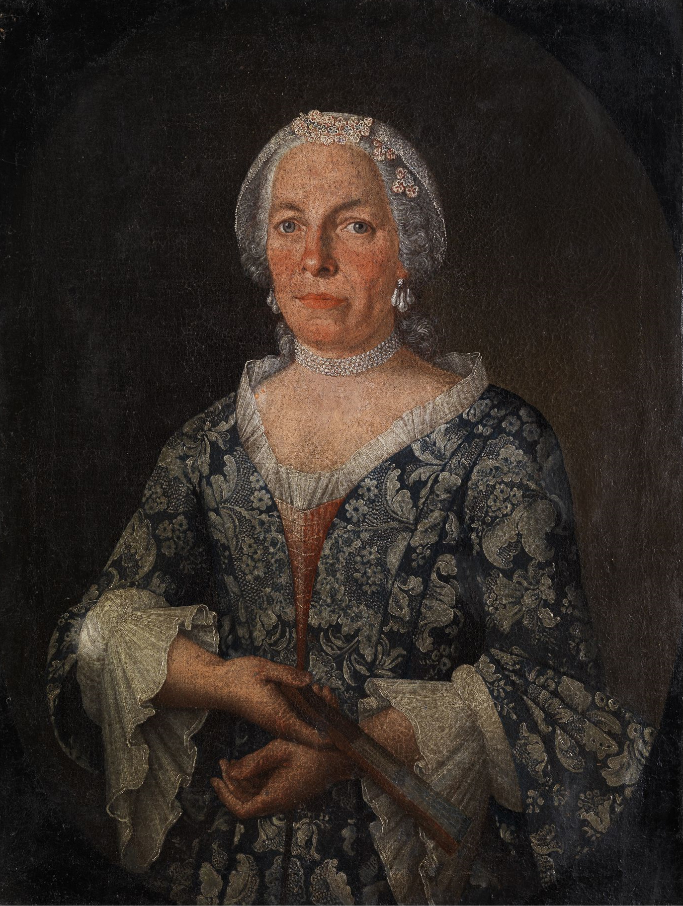 Karoline von Kirchberg, Gräfin von Sayn-Hachenburg (1720–1795), Gemahlin von Johann Friedrich Alexander, Fürst zu Wied, Öl auf Leinwand. 86 x 64,5 cm